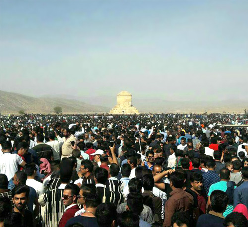 هفتم آبان 1395، پاسارگاد آرامگاه کوروش